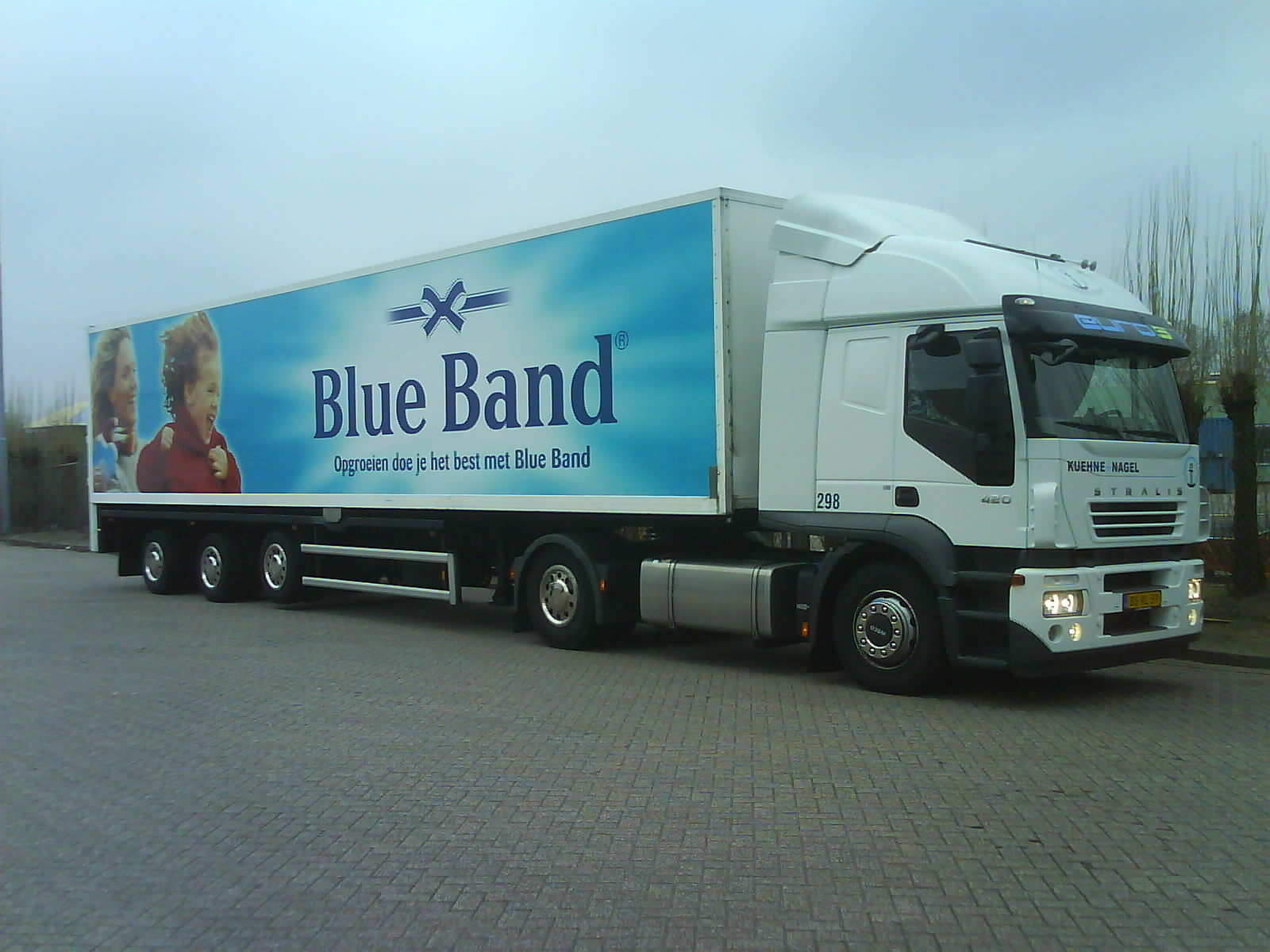 Blue Band oplegger nieuwe stijl